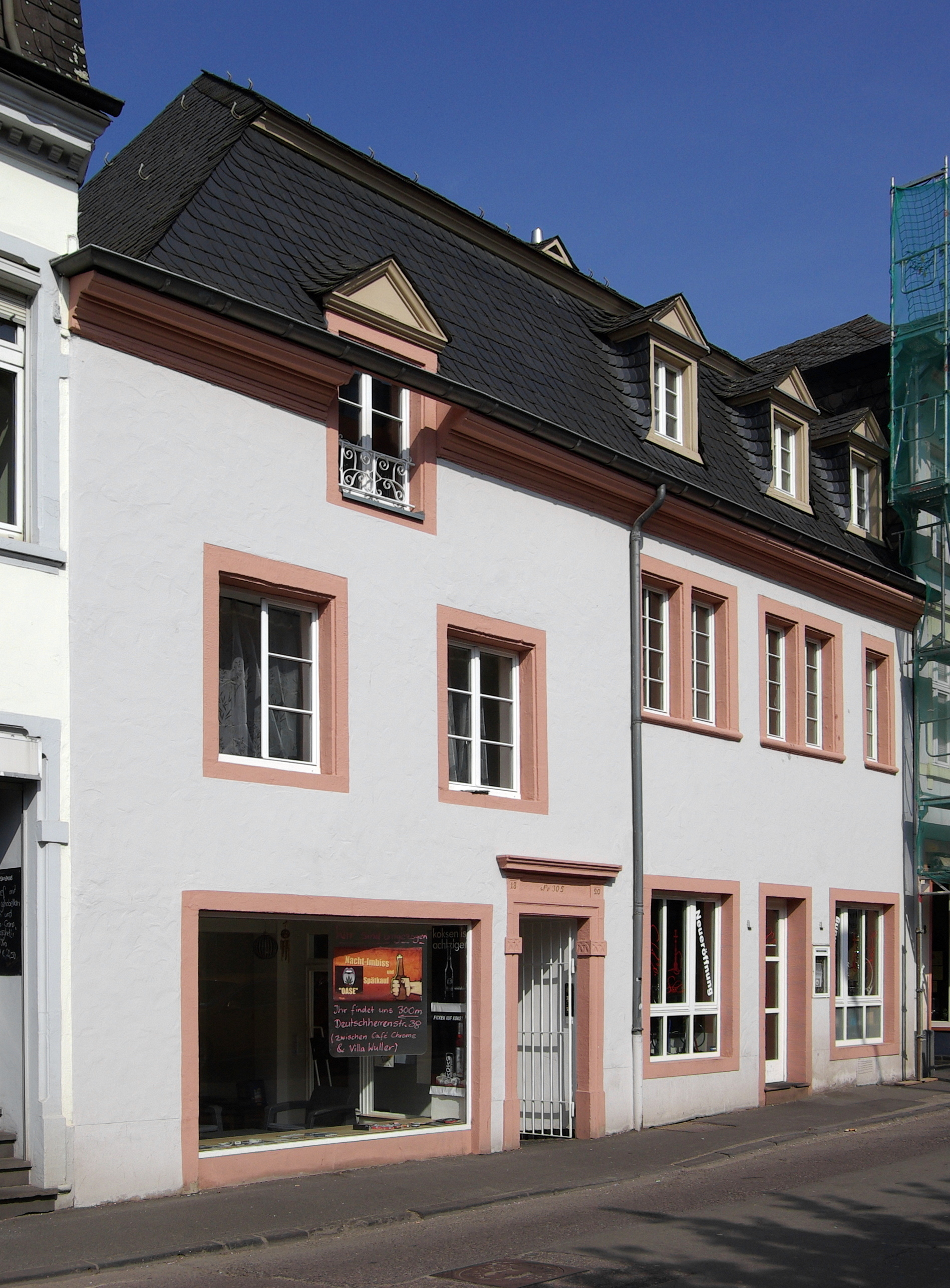 Trier, Moselstraße/Pferdemarkt 7